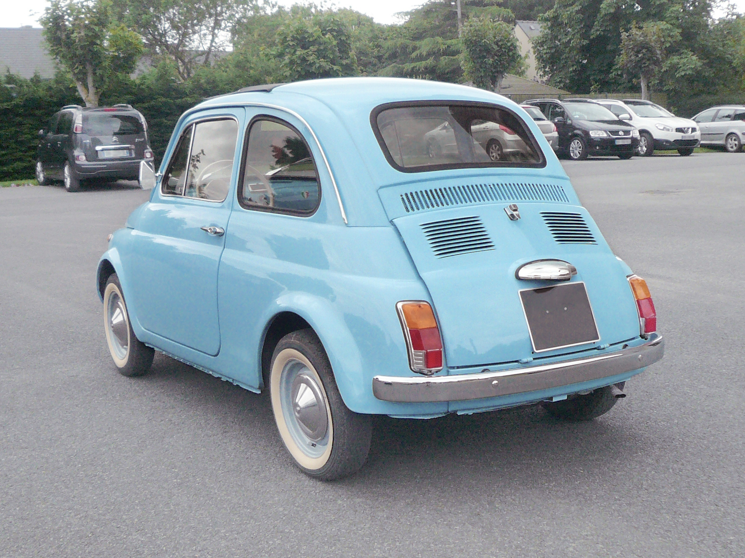 Fiat 500, l'originale, toute belle dans cette livrée bleue ciel et les flancs blancs sur ses pneus. Il ne manque plus que le Klaxon italien au son de "La Cucaracha" !